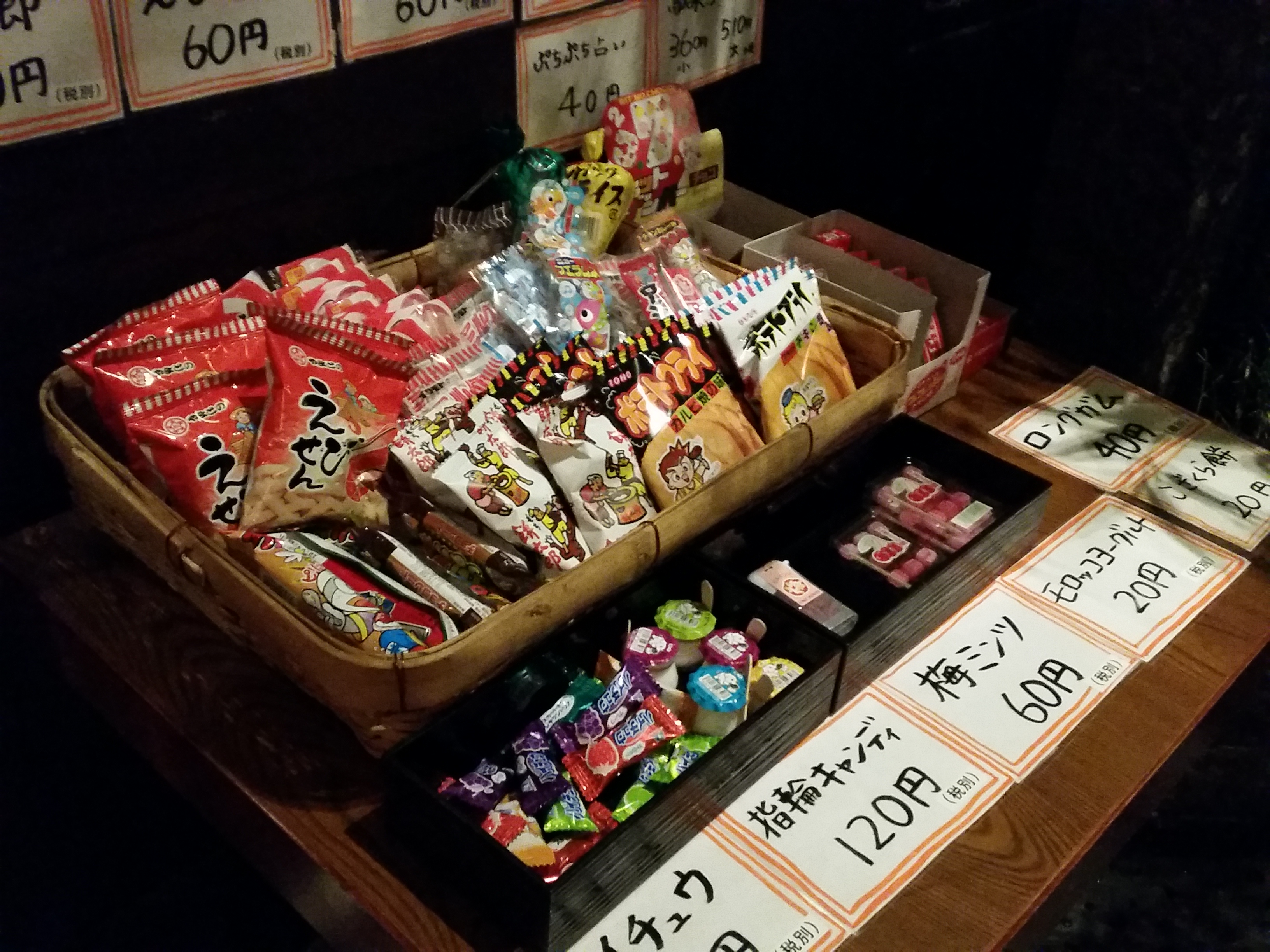 買いたかったけど買えなかった。